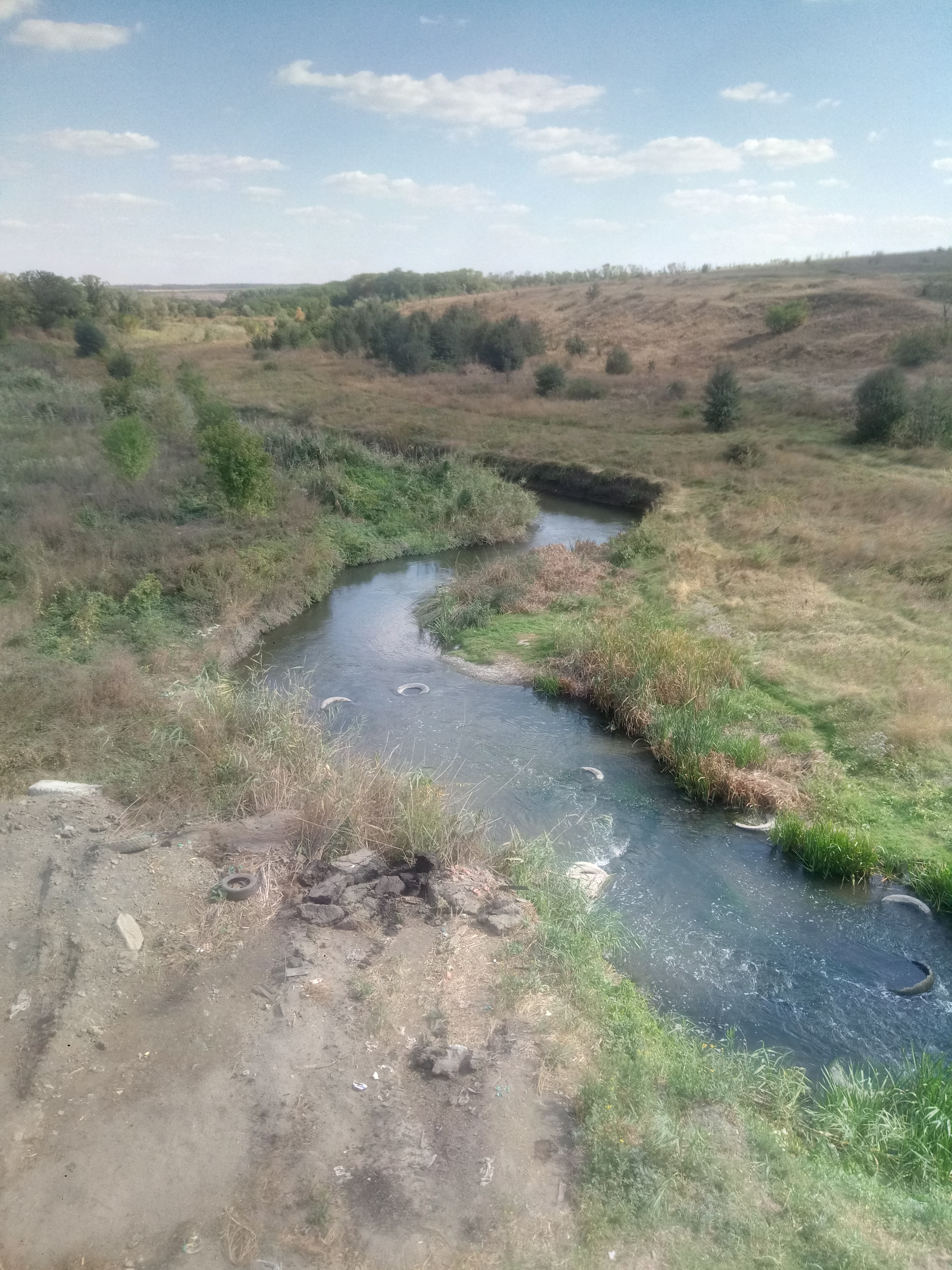 Река Кундрючья в хуторе Пролетарка (Красносулинский район ростовской области)